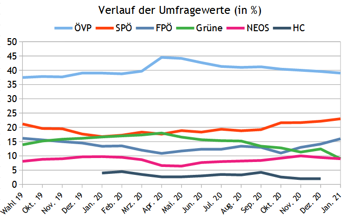 Wahl zum 28. Nationalrat in Österreich, Umfragen